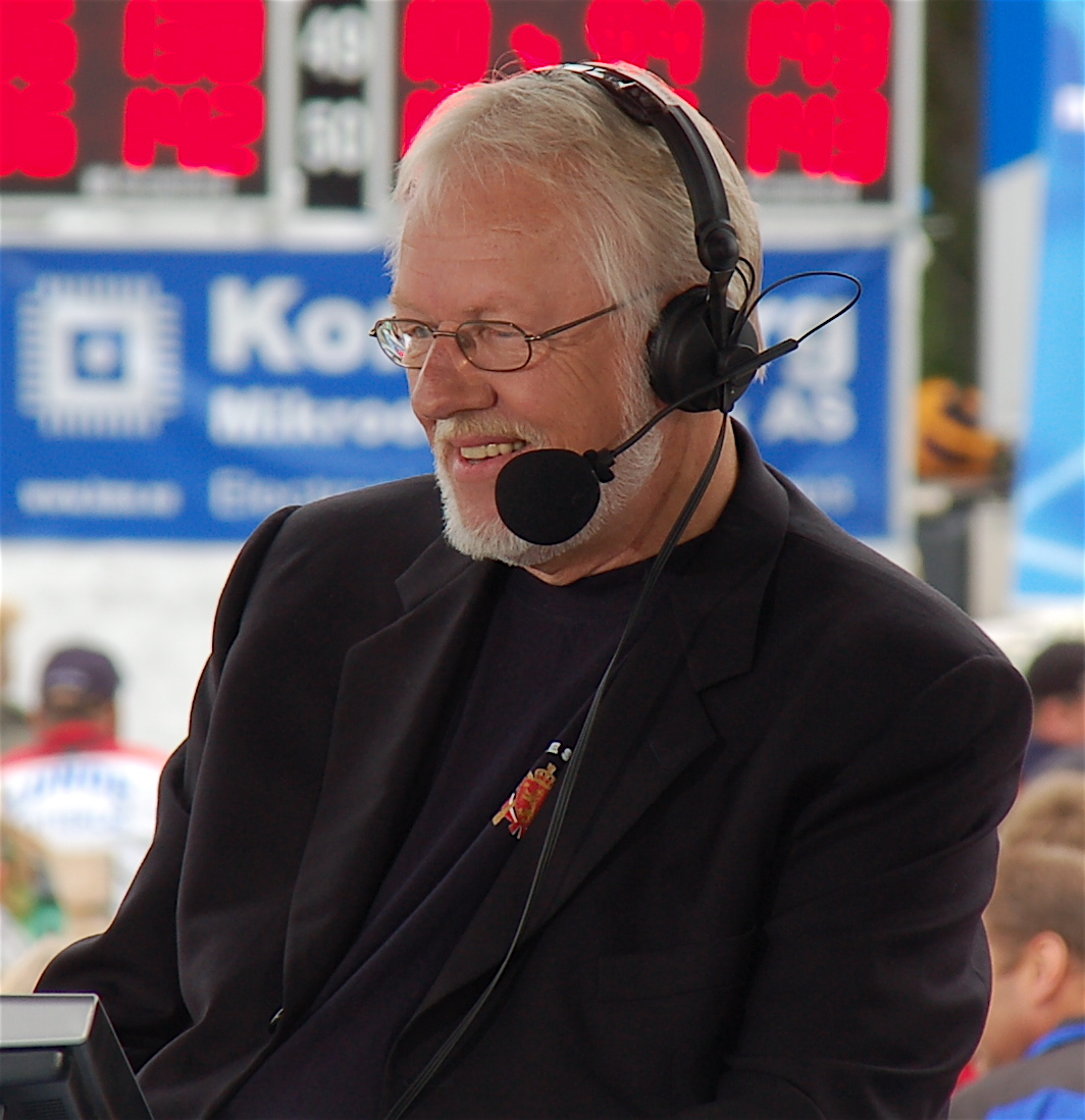 Kjell Kristian Rike, NRK, på Landsskytterstevnet 2007